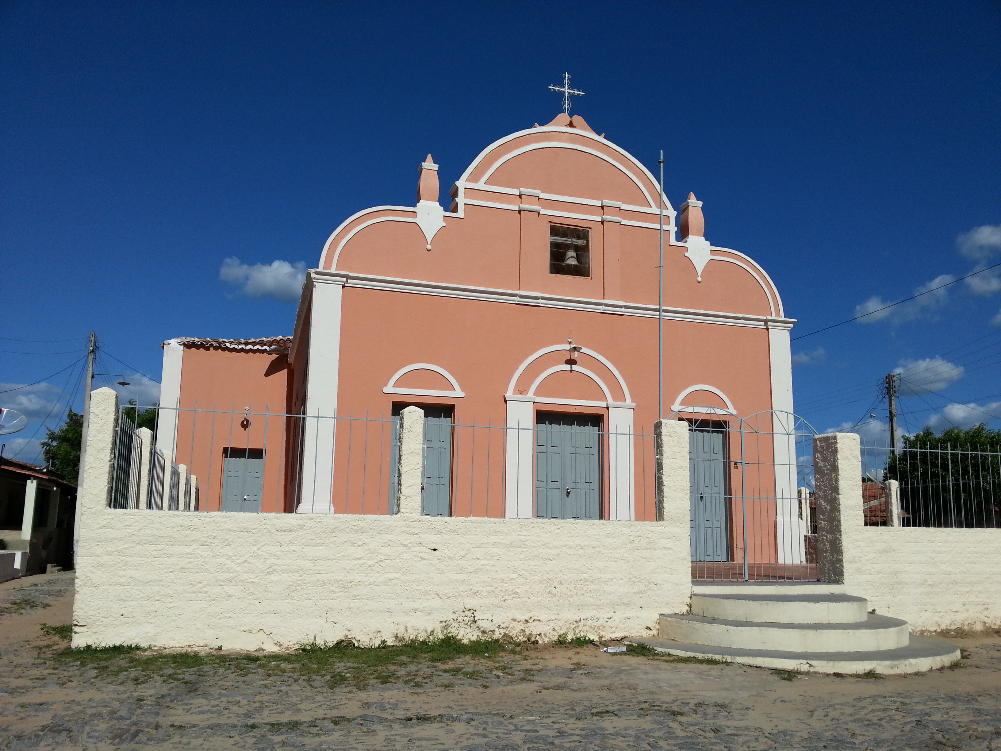 Capela localizada na sede do distrito de Juatama, município de Quixadá.